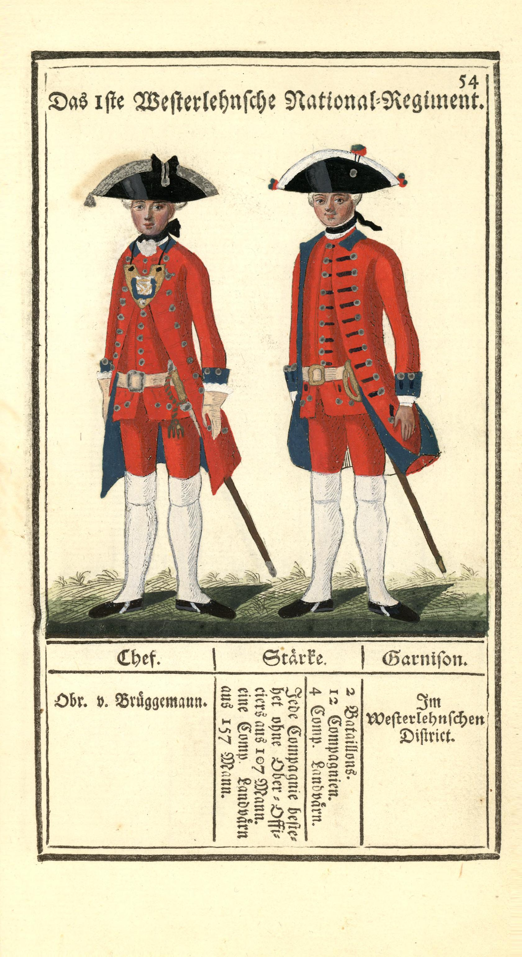 Illustrasjon hentet fra boken "Vorstellung der sämtlichen Königl. Dänischen Armee" av Bertram, Carl og utgitt av Carl Bertram (dk, 1763)